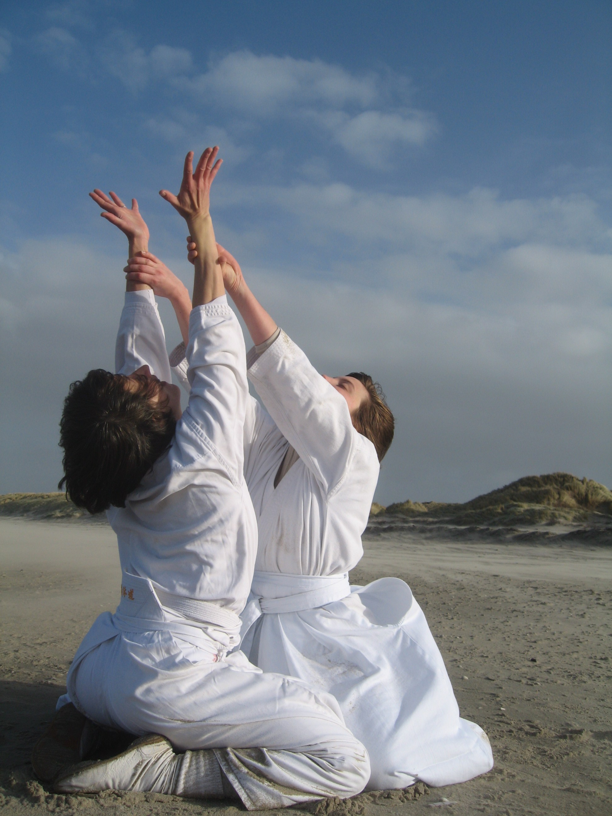 Shintaido France Kangeiko Tenshingoso